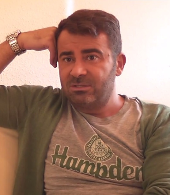 Avance entrevista Jorge Javier Vazquez para Entrevistados.es Junio 2013.